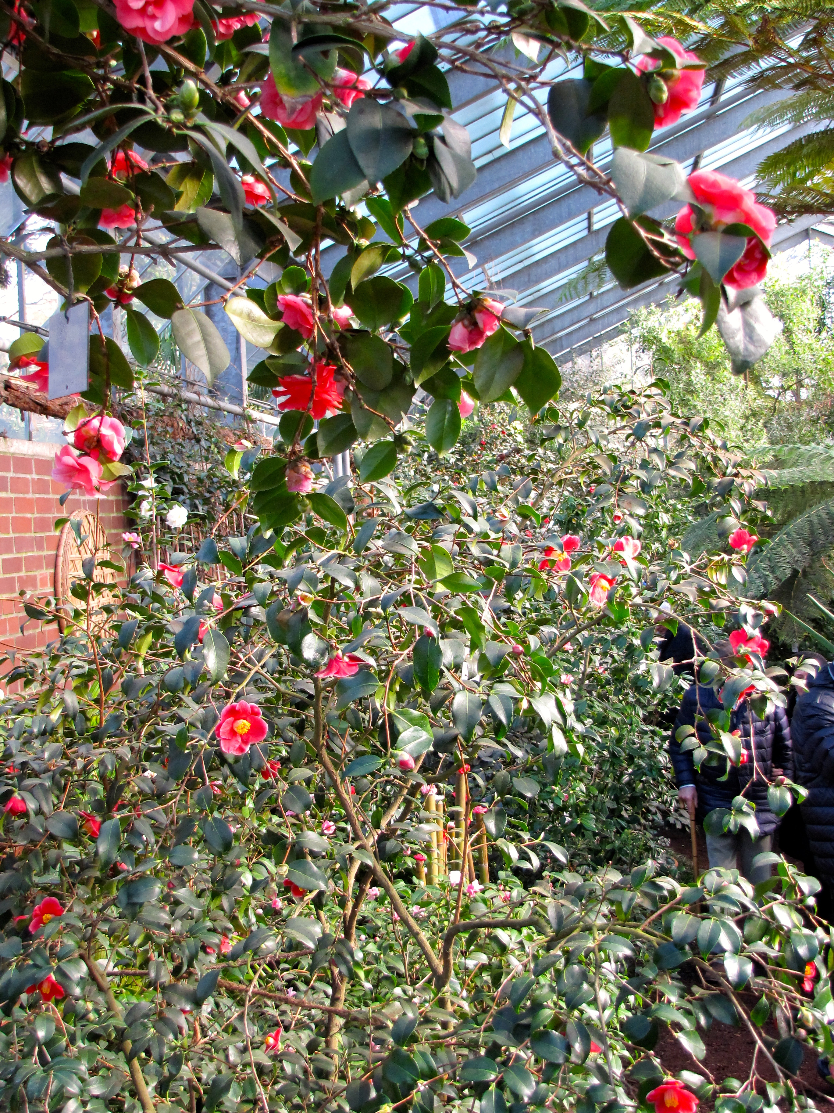 Das 1964 errichtete Subtropenhaus beherbergt die seit 2000 aufgebaute Kameliensammlung